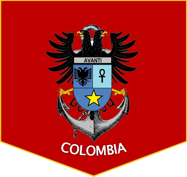 Escudo del municipio Brazuelo de Papayal en Bolivar, Colombia. Realizado en paint brush.